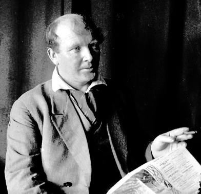 portrett, mann, forfatter.